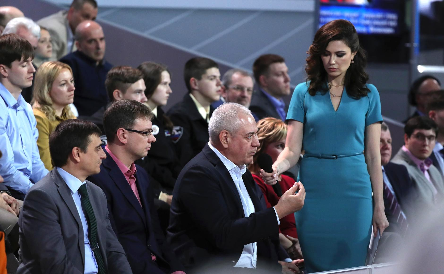 14-я Прямая линия с Президентом России Владимиром Путиным. Главный редактор радиостанции «Говорит Москва» Сергей Доренко во время «Прямой линии с Владимиром Путиным»